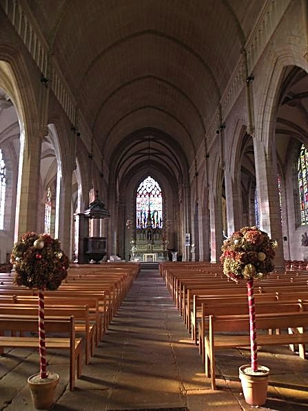 Vue intérieure de l'église Saint-Léonard de Fougères (35).